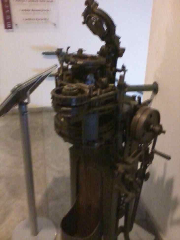 Macchina per calze da uomo esposta